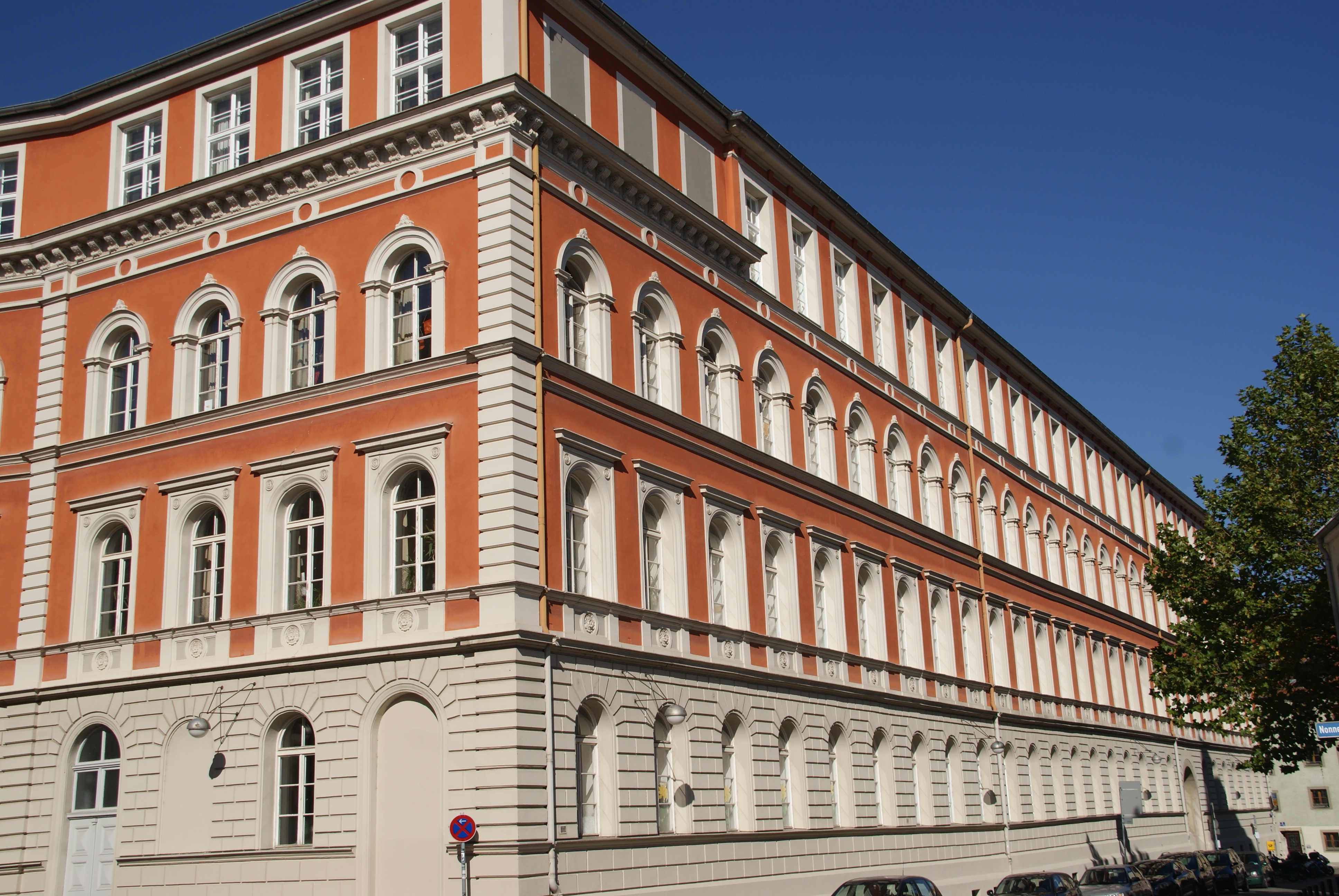 Kreuzschule Regensburg, am Judenstein 1, erbaut 1870-1909, aufgestockt 1926/27